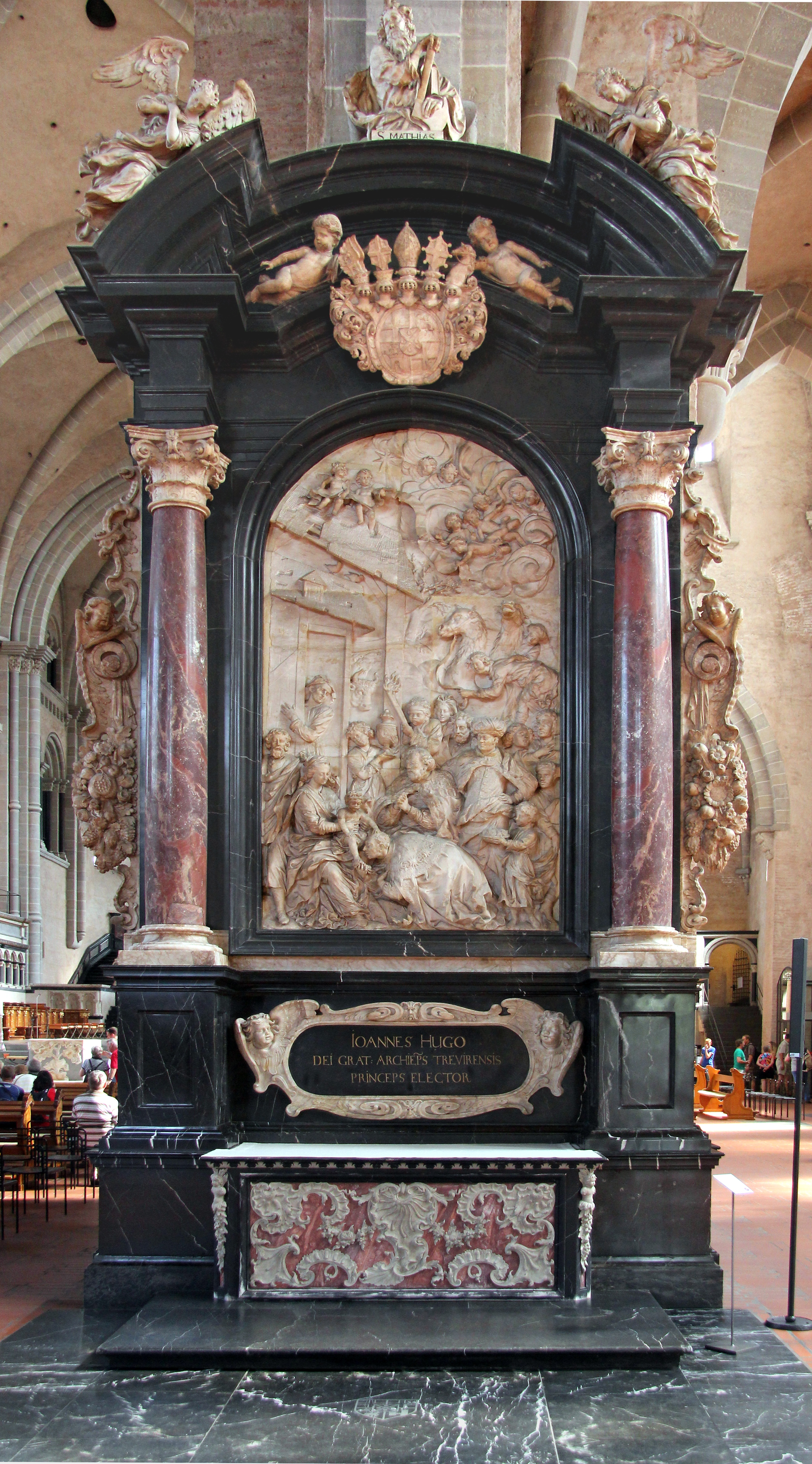 Johann Mauritz Gröninger: Dreikönigenaltar als Grabaltar des Kurfürsten Hugo von Orsbeck im Trierer Dom